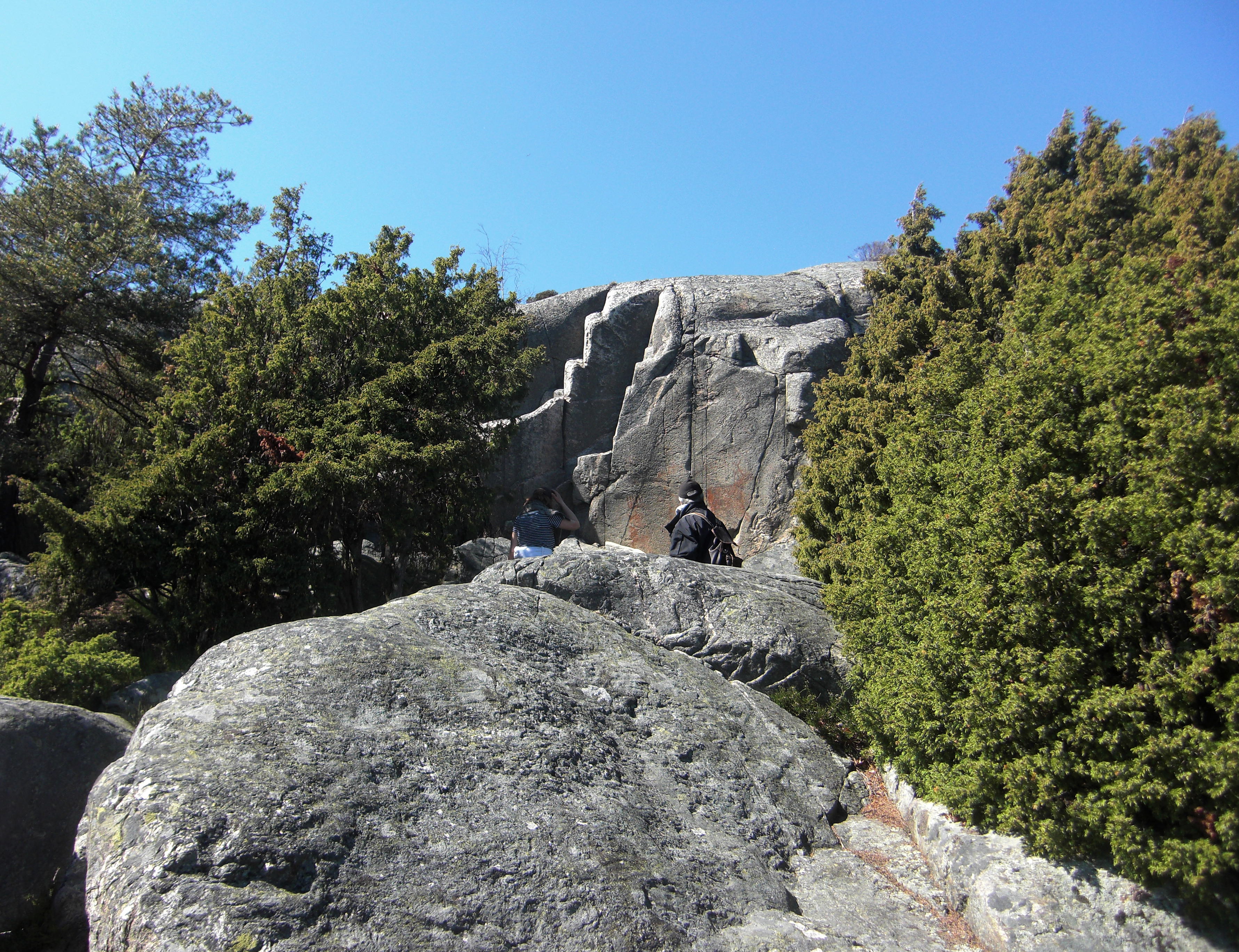 Hällmålningen i Tumlehed (RAÄ-nr Torslanda 216:1) i Torslanda socken, Västra Hisings härad, Göteborgs kommun, Bohuslän, Västra Götalands län, Sverige. Här ser vi hällmålningen på något håll med besökare vid målningen. Rödockran är något digitalt förstärkt i Photoshop. Hällmålningen omges av växtlighet som enbuskar (Juniperus communis) och tallar (Pinus sylvestris).